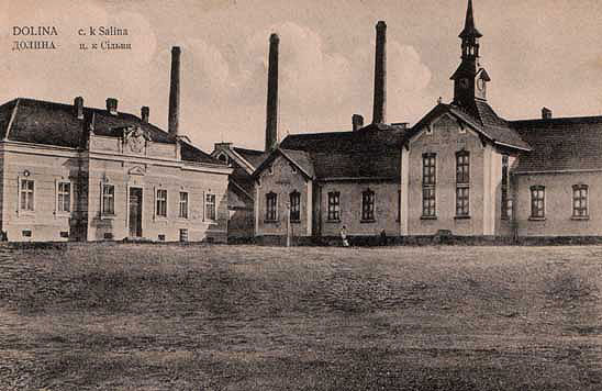 Солеварня. Поштова листівка